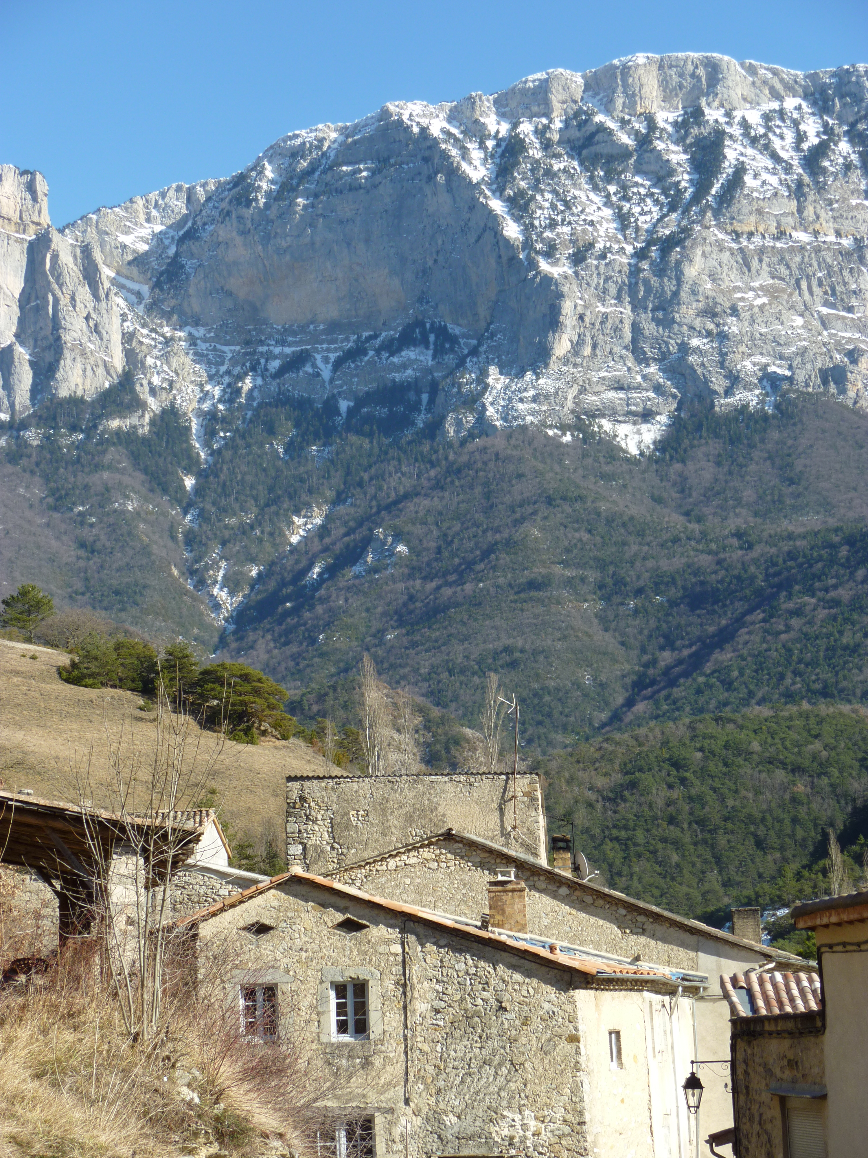 Le village de Romeyer dans la Drôme, avec la montagne de Glandasse en fond.